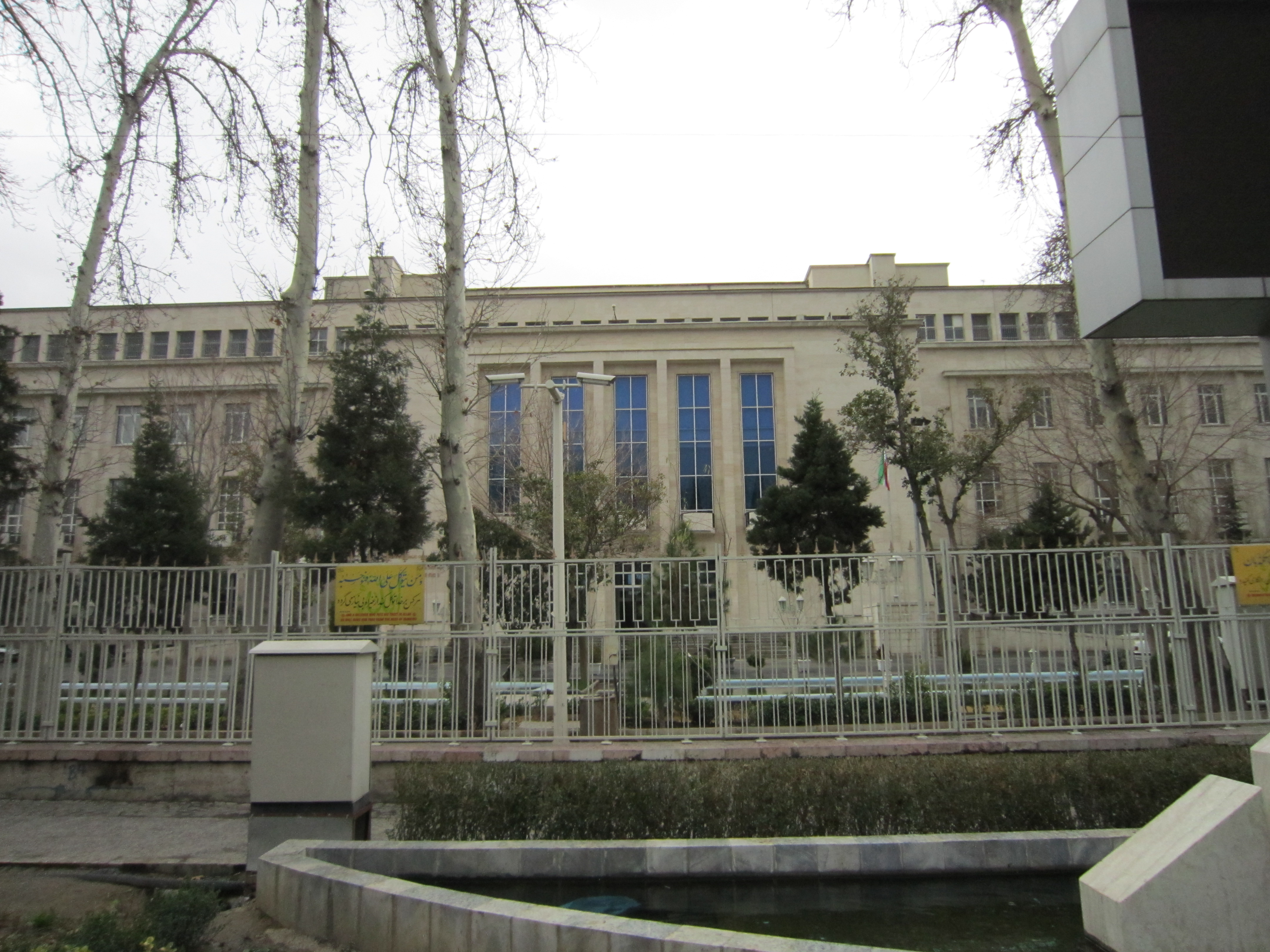 ساختمان وزارت اقتصاد و دارایی